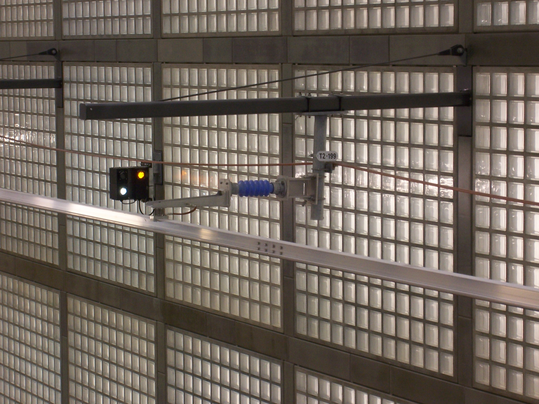 City-Tunnel Leipzig, Stromschienenoberleitung und Sonderform eines Lichtsignals in der Station Wilhelm-Leuschner-Platz